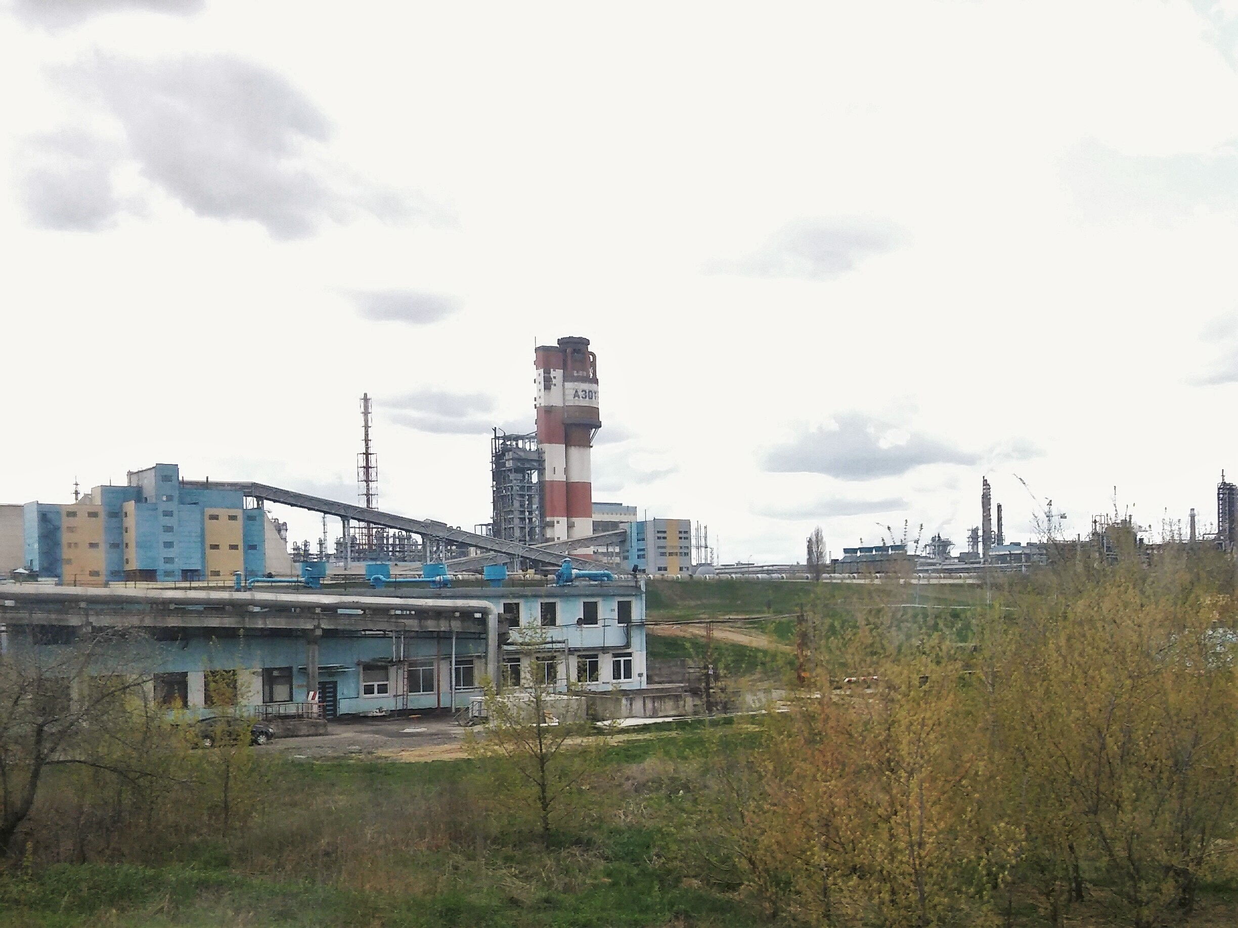 Вид на предприятие "Азот" (Гродно, Республика Беларусь)